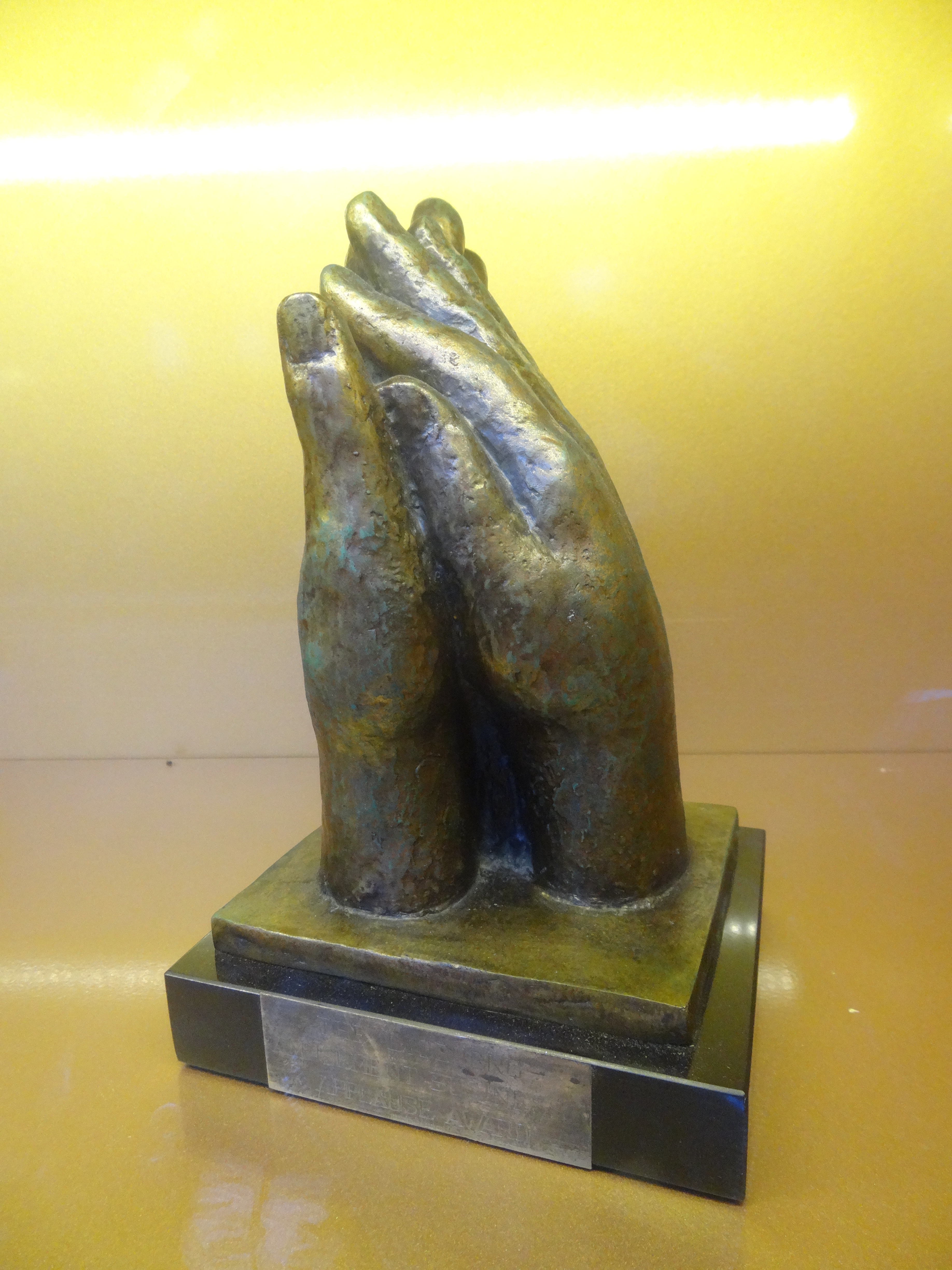 Applause Award décerné à Europa Park en 1990